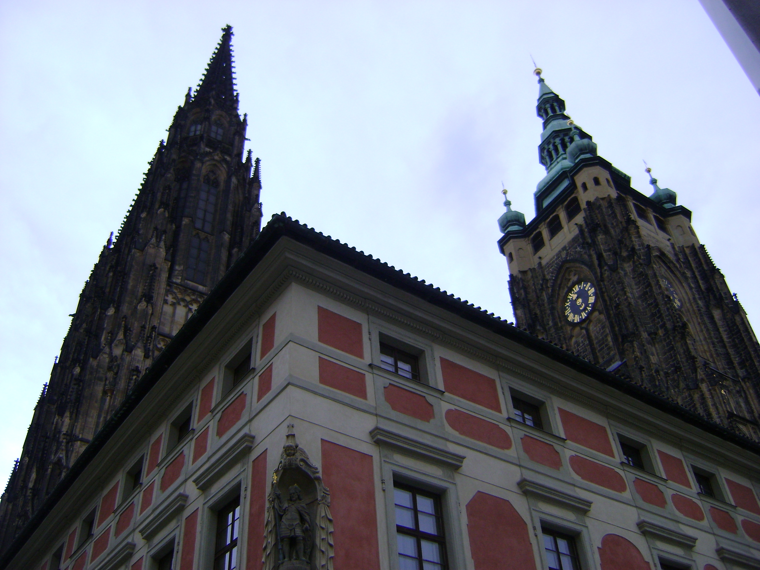 Собор святого Віта у Празі.